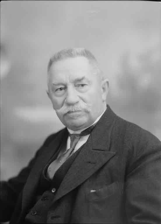 Presseporträt: Ständerat Andreas Laely (Graubünden, Schweiz)